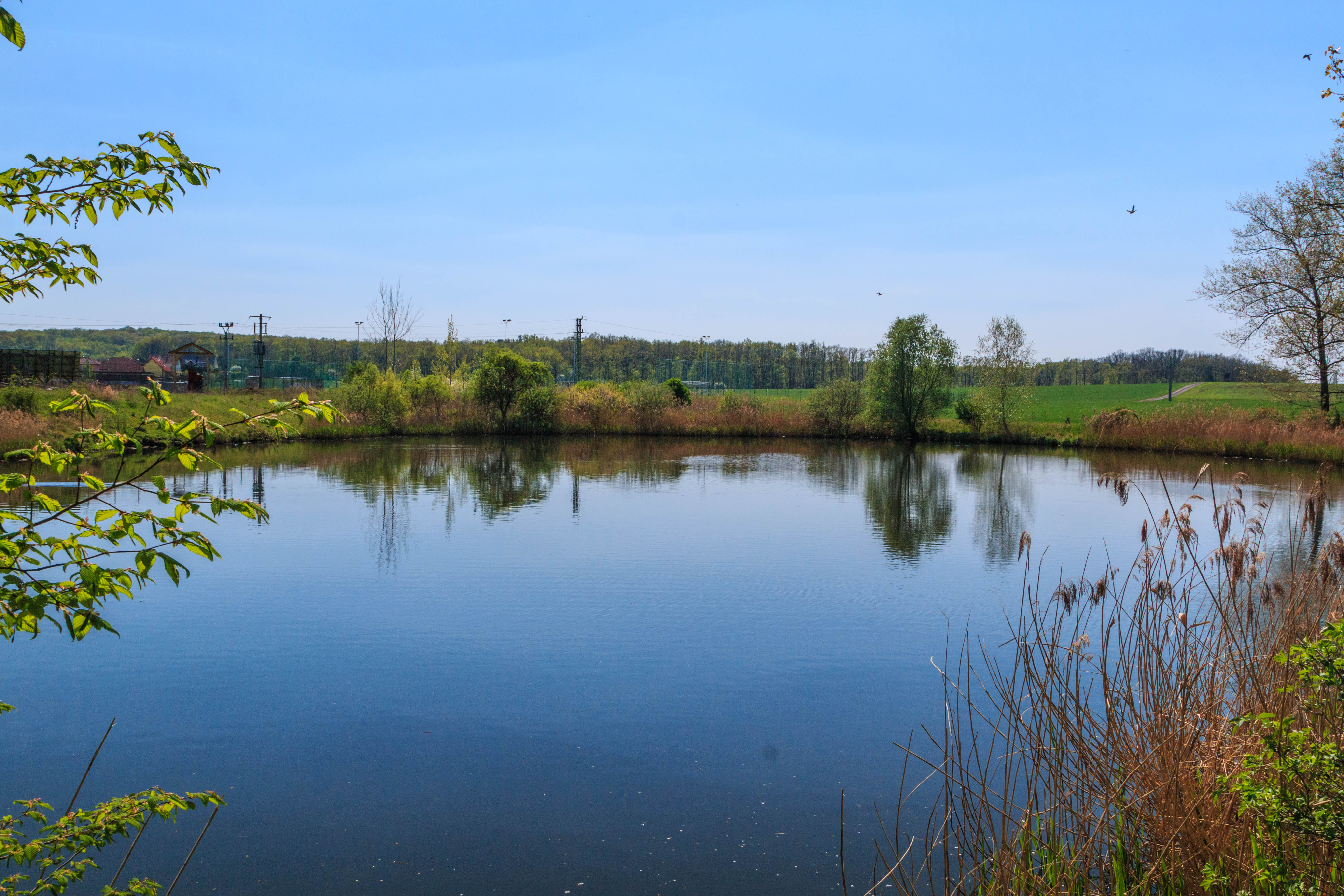 Rybník Čeperka u Kobyliv Project: Vodstvo.